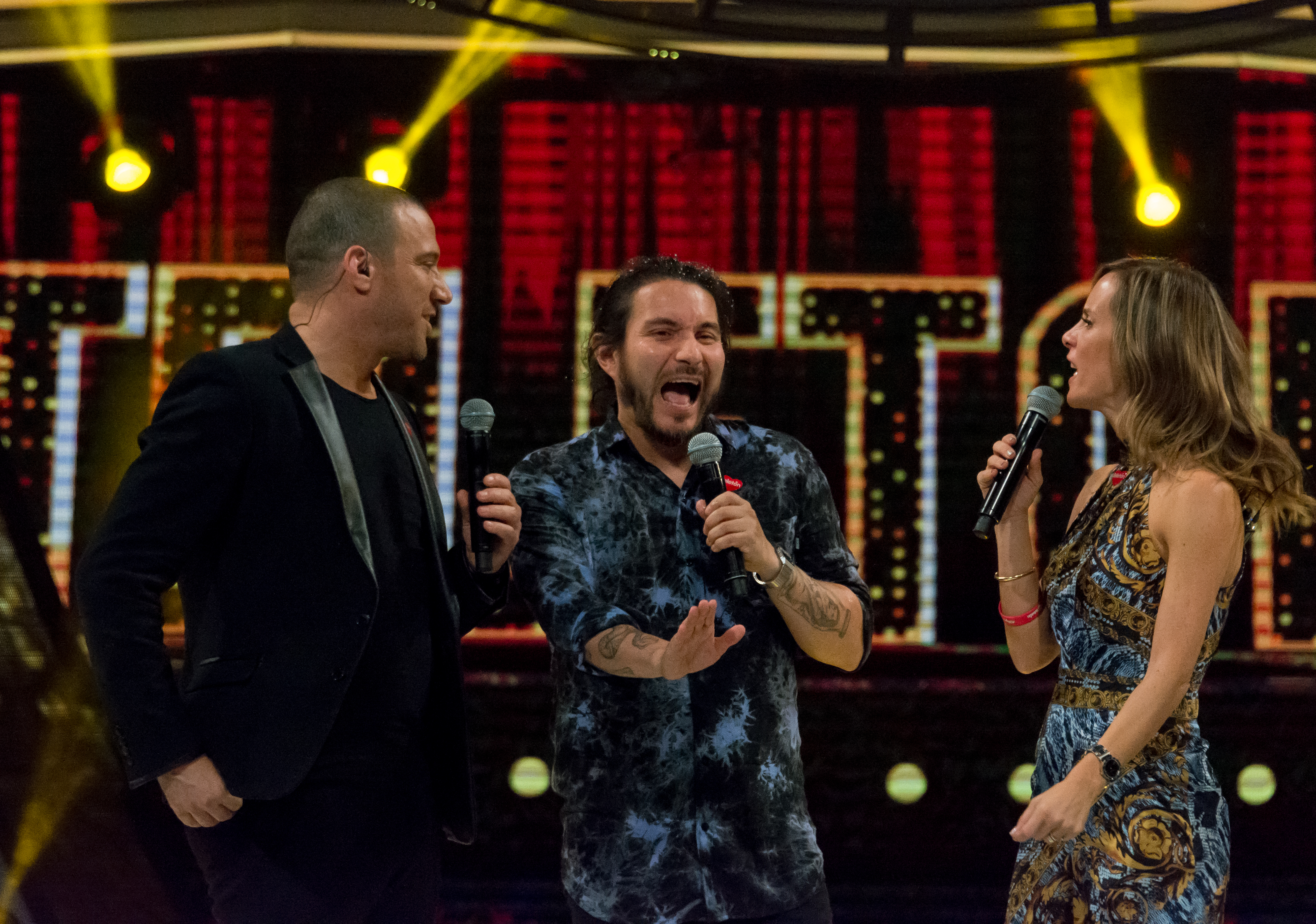 Julián Elfenbein, Felipe Avello y Diana Bolocco, Teletón 2018, Teatro Teletón, Santiago, Chile.